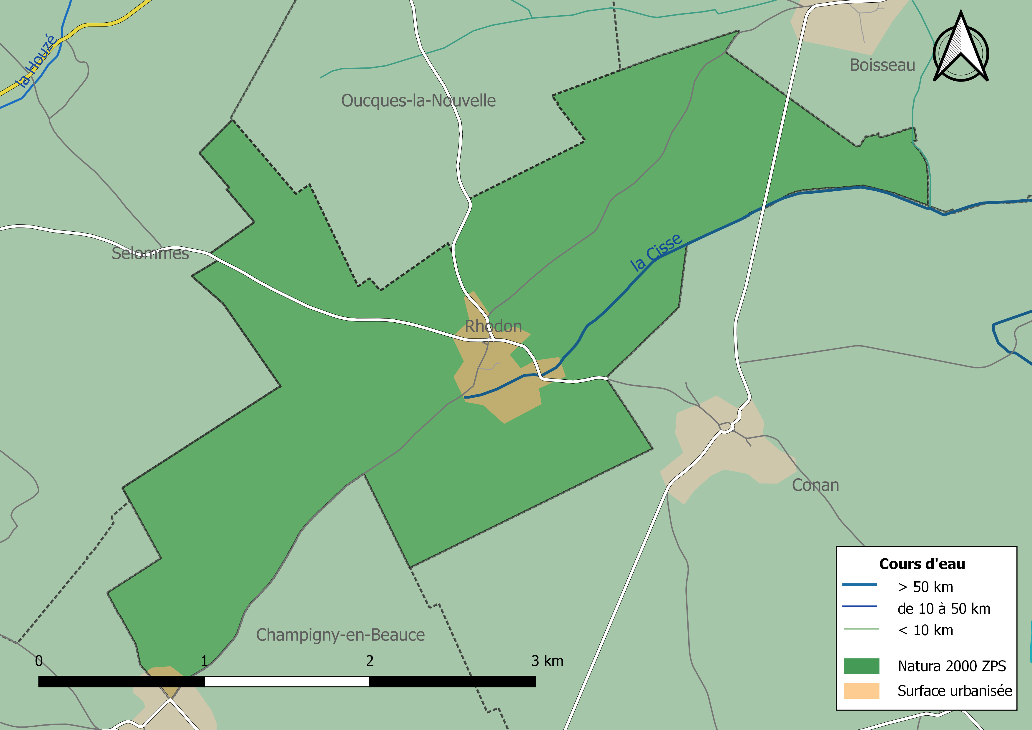 Carte du sitesu Natura 2000 de type ZPS de la commune de Rhodon (Loir-et-Cher) (France).